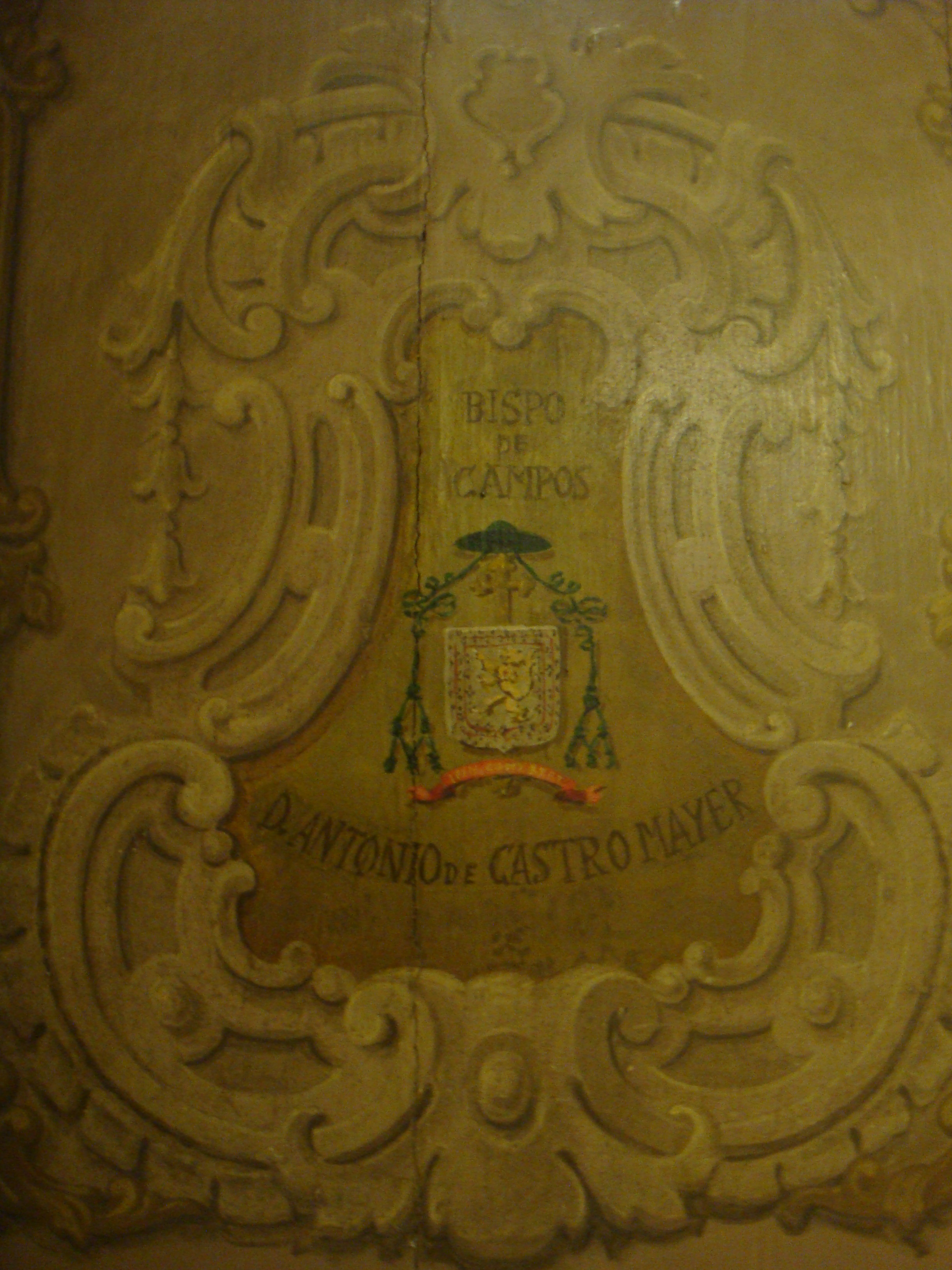 Afresco do Brasão do Bispo brasileiro de Campos dos Goytacazes, Dom Antônio de Castro Mayer, pintado na parede esquerda do presbitério da "Igreja de Nossa Senhora do Carmo", pertencente a Ordem Terceira de Nossa Senhora do Monte Carmelo, e atendida pela Administração Apostólica São João Maria Vianney, na cidade de Campos dos Goytacazes, RJ, Brasil.